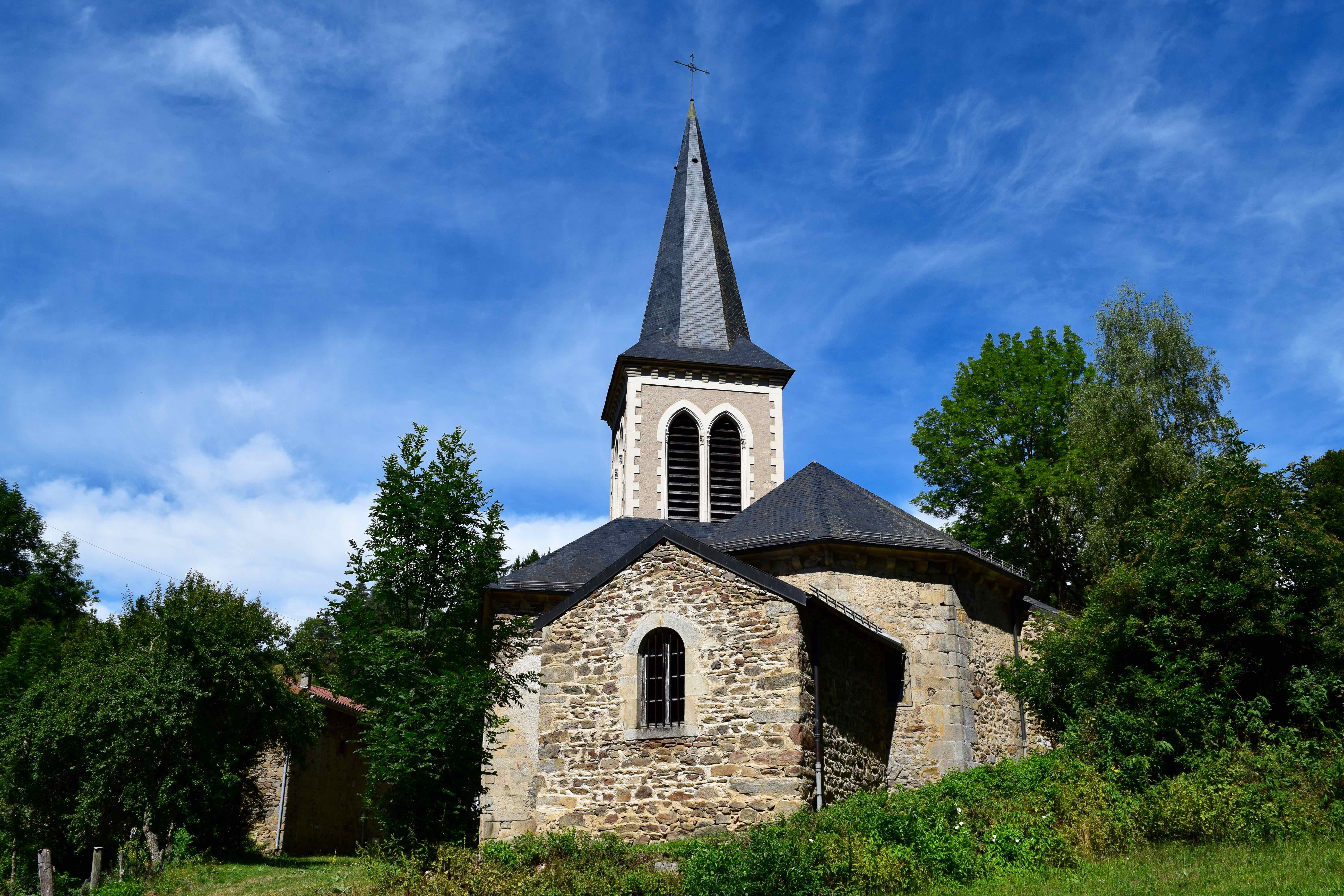 Église Saint-Pierre de Novacelles .